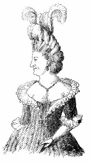 Madame Girard de profil, habillée en eprruque et poudrée.